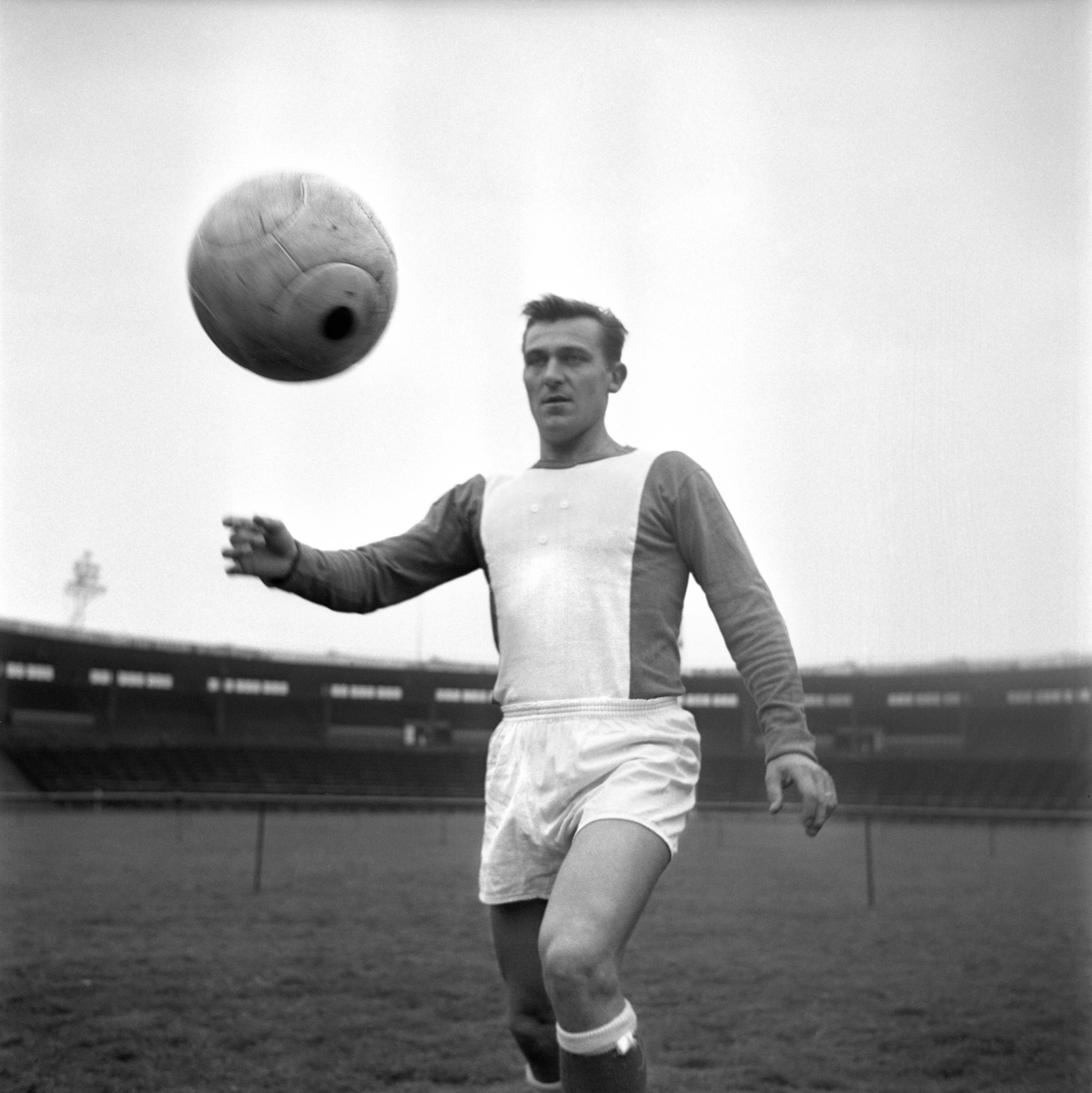 Stadium municipal de Toulouse, 1bis allées Gabriel-Biénès. Entre 15 et 18 octobre 1962. Ernest Schultz (joueur du Toulouse Football Club). plan 3/4 du joueur en train de jongler avec un ballon (vue de face) ; en arrière-plan gradins.